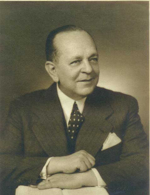 Manuel Ferreira (dirigente deportivo)Nacido el 17 de febrero de 1889, fue hijo de doña María Sosa y de don Manuel Ferreira, oficial de la marina brasileña que hizo toda la campaña bélica durante la Guerra de la Triple Alianza, a cuya culminación, se radicó en el Paraguay, dedicándose a actividades comerciales.